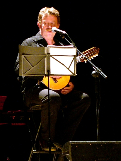 Luis Martín performing with Nuevo Mester de Juglaría in Castelló